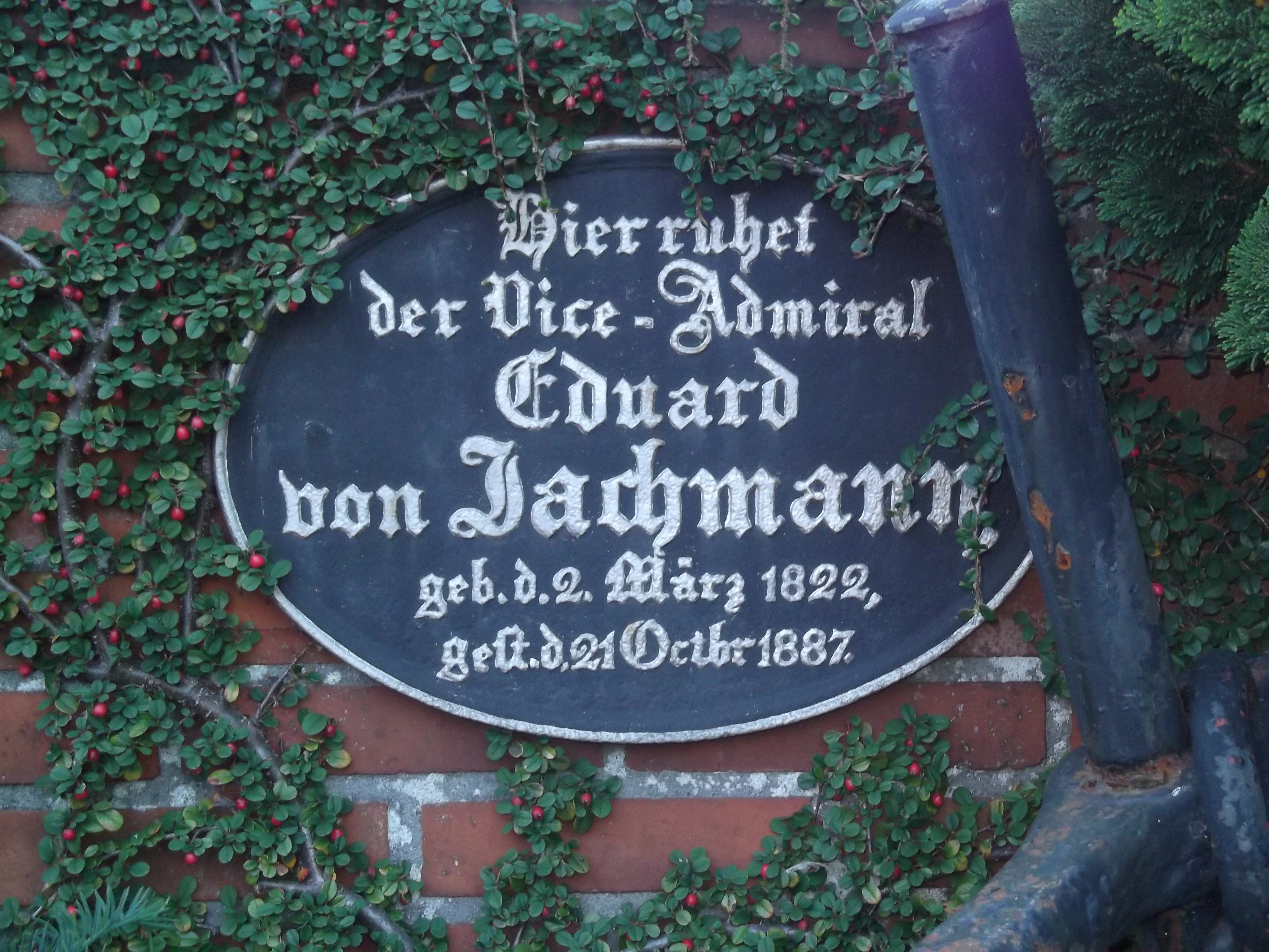 Die Plakette ist auf dem gemauerten Grabstein von Vizeadmiral Eduard von Jachmann angebracht und stammt vermutlich von der ursrpünglichen Grabanlage von 1887. Das ursprüngliche Grabmal existiert nicht mehr.